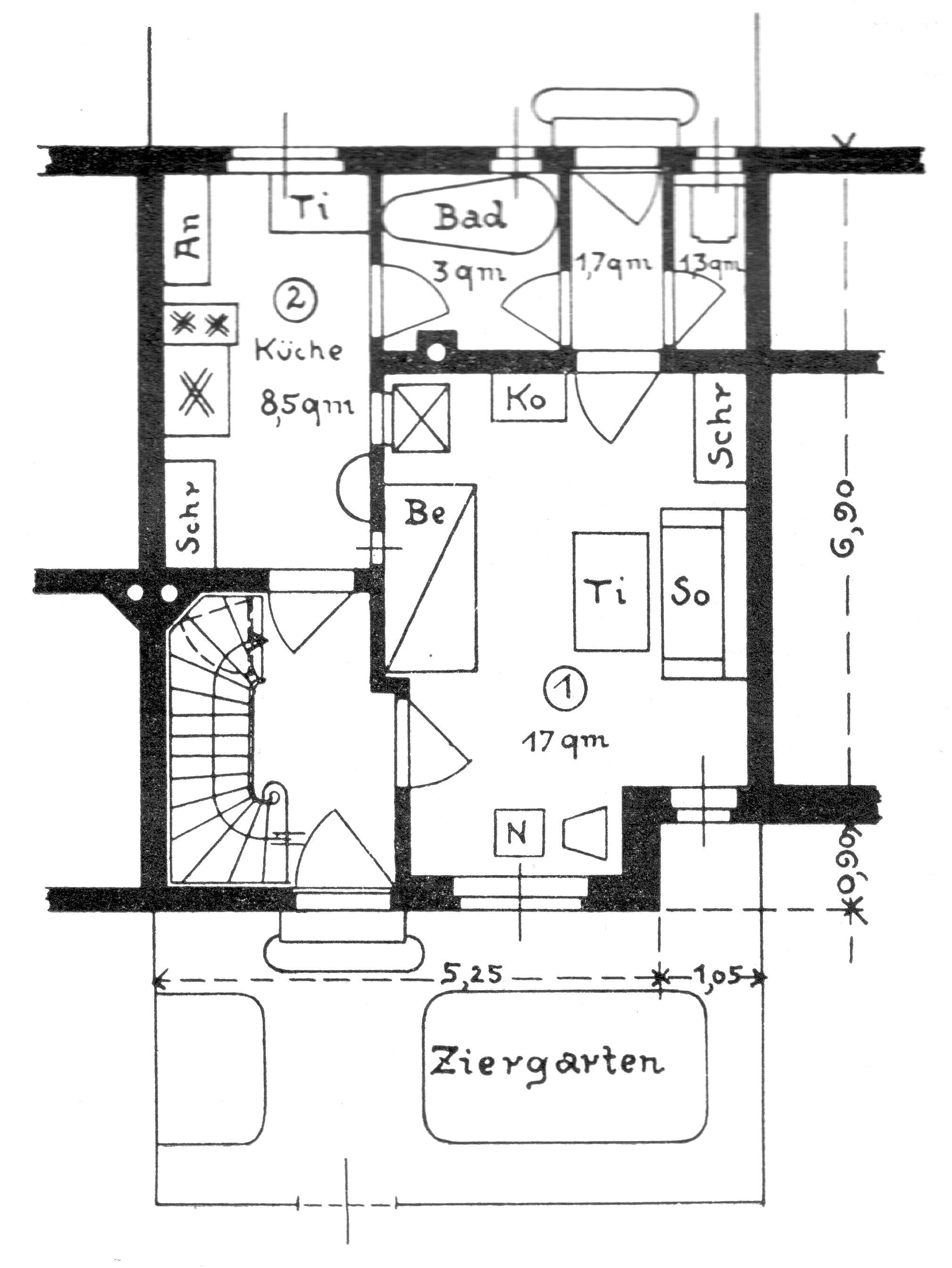 Albert Lehr, K. Direktionsassistent des Bayer. Vereins zur Förderung des Wohnungswesens (E. V.): Die Wohnweise der Arbeiterfamilien in Bayern. 1911. Abbildung nr. 35, Seite 88. Grudrissvorschlag für eine Arbeiterwohnung Schriften des Bayerischen Vereins zur Förderung des Wohnungswesens (E. V.), Heft 2. Verlag von Reinhardt, München Paperback, 89 Seiten, 14,5 x 22 cm